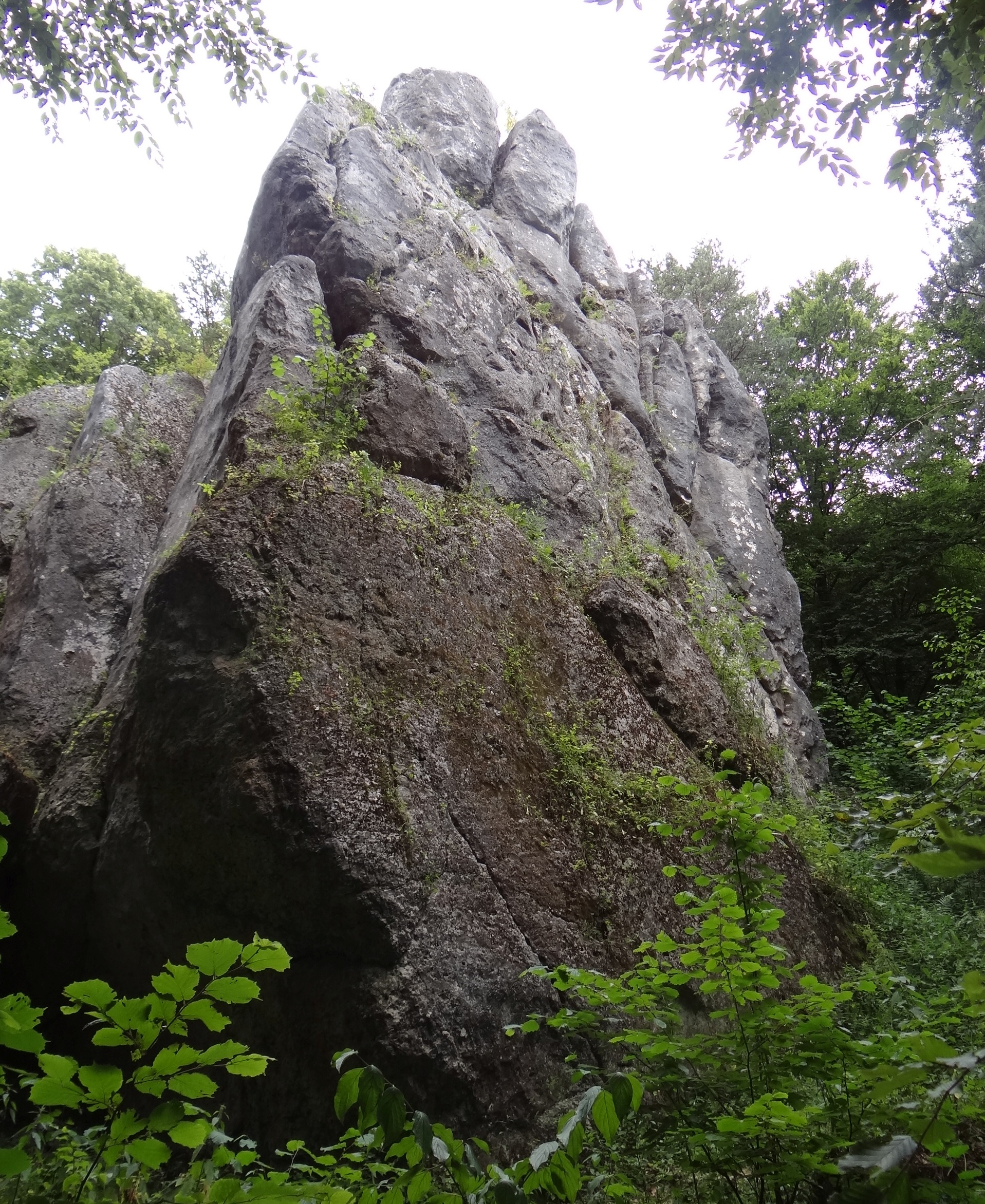 Skała Słupkowa na wzgórzu Łężec między Morskiem a Podlesicami